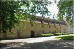 Dans le prolongement du corps de logis Renaissances, les écuries et anciens greniers à grains.